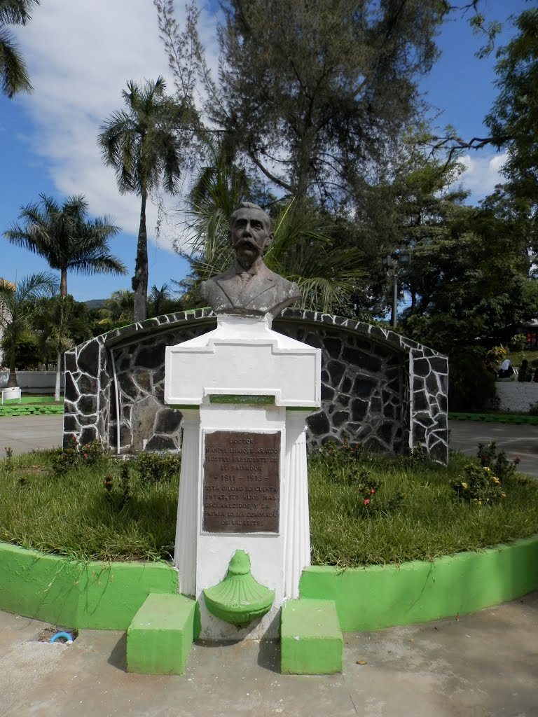 Busto de Manuel Enrique Araujo situado en Usulutan.